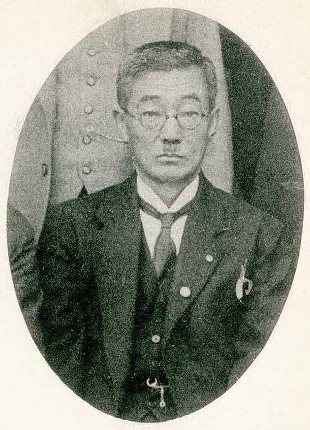 Bân-lâm-gú: 谷河梅人 Tanikawa Umendo